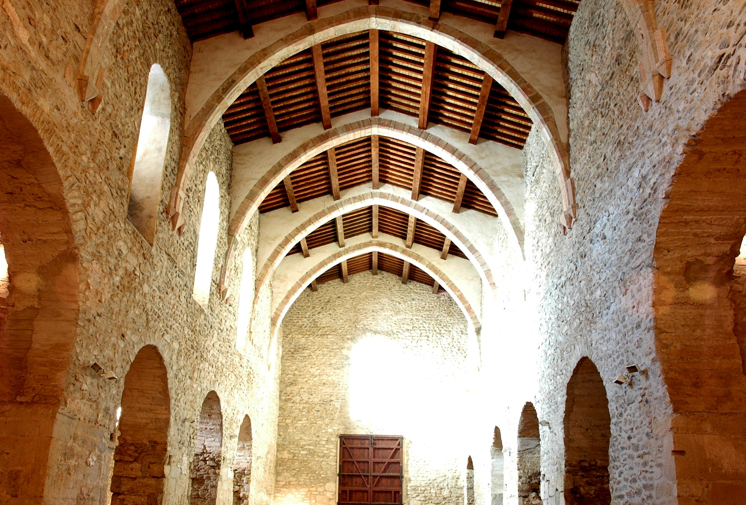 Sant Miquel de Cuixà - Interior església